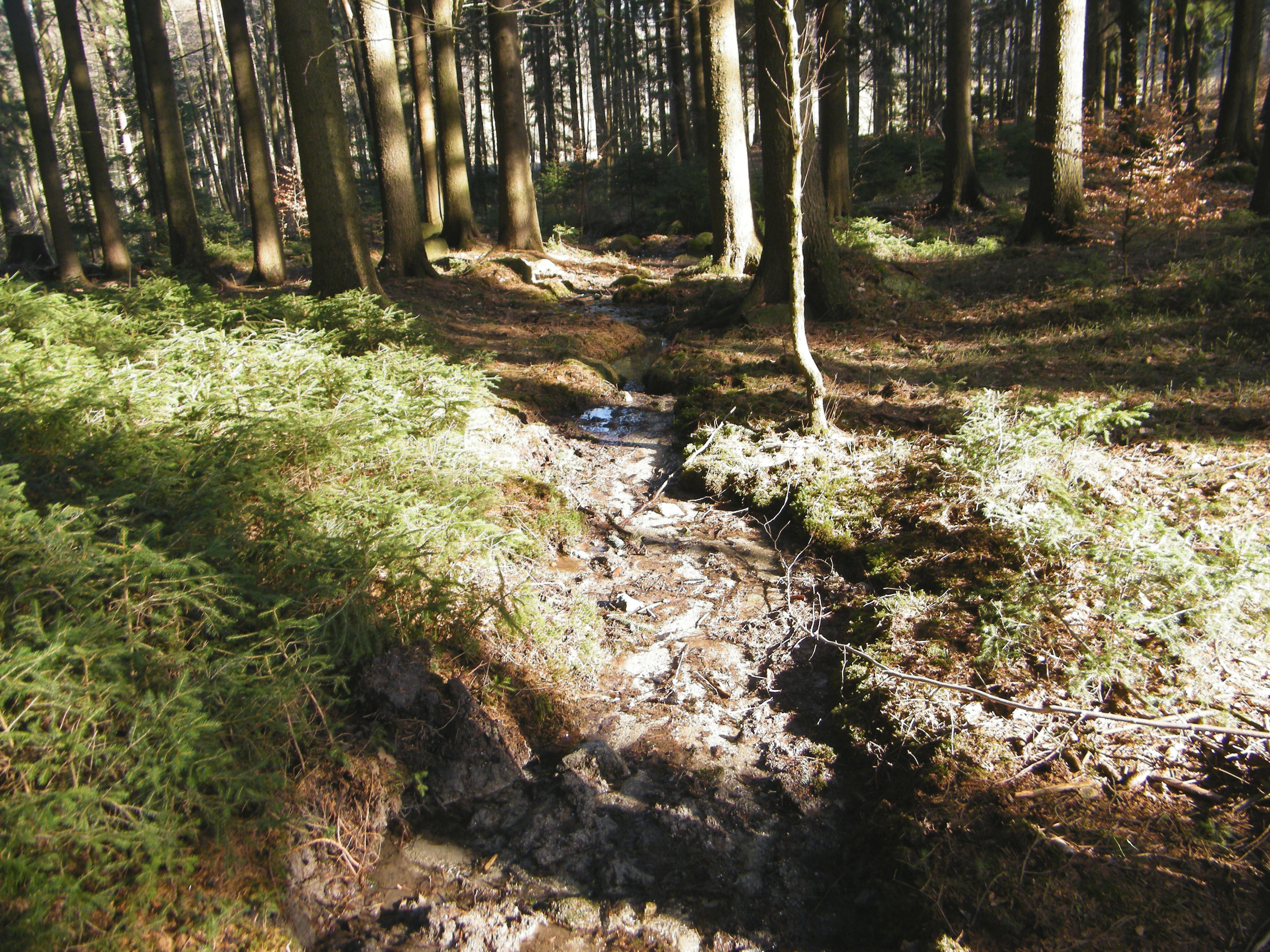 Studený potok na svahu Tanečnice, Mikulášovice